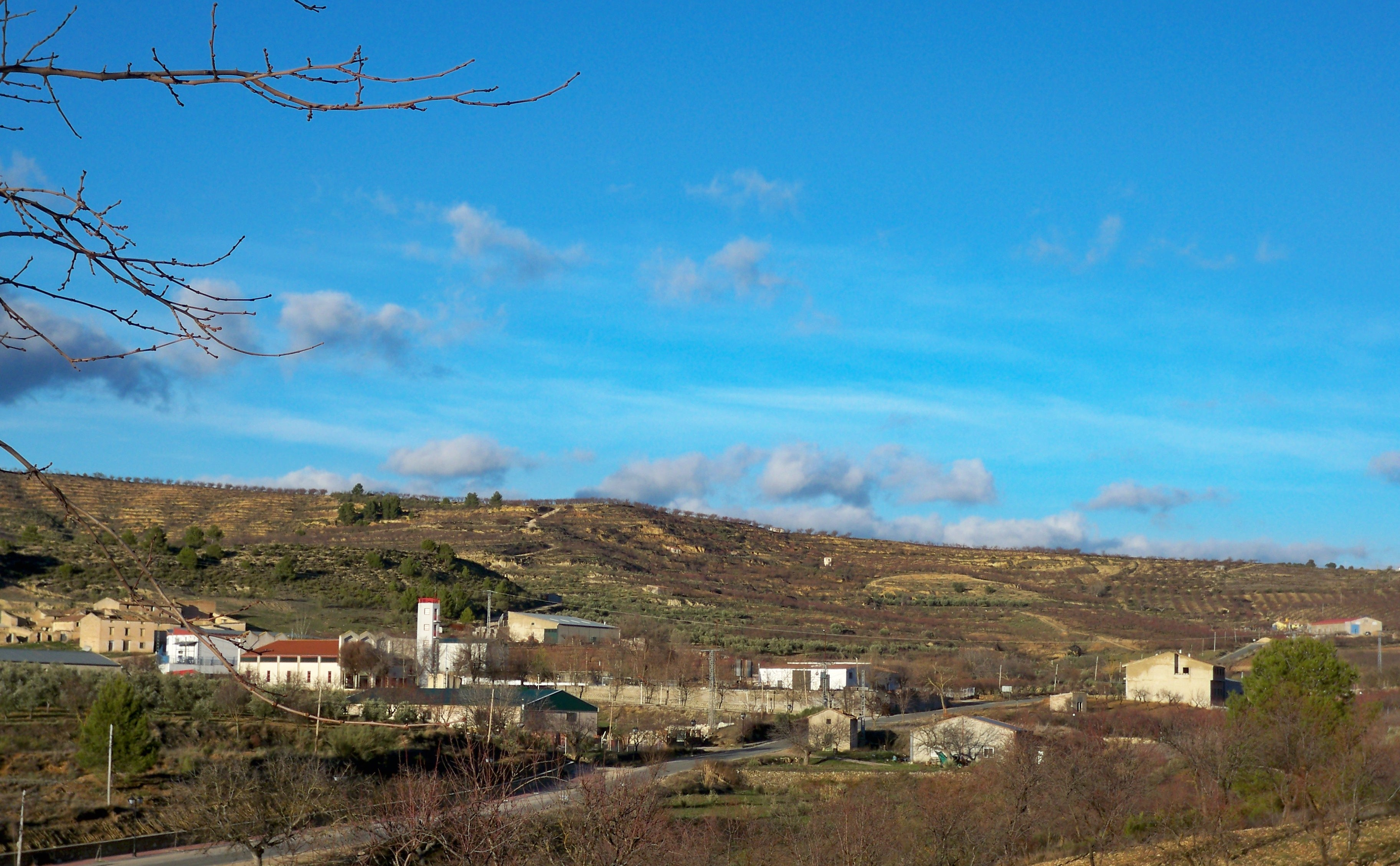 Vista de la zona industrial de Molinicos (Albacete)